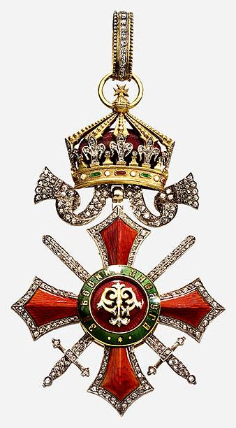 Орден_„За_Военна_Заслуга“_III_степен_с_брилянти